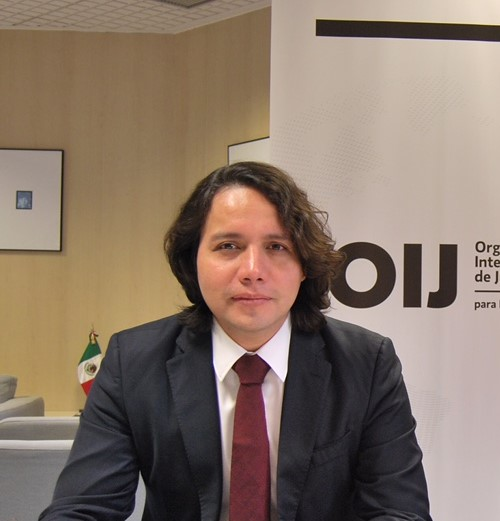 Foto del secretario General, Max Trejo